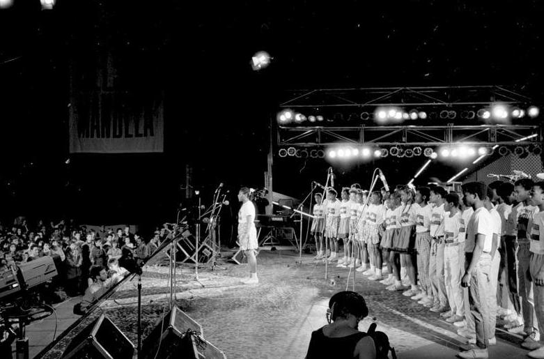 Berlin, Festival des politischen Liedes ADN/ZB/Uhlemann/17.2.89/We/Berlin: 19. Festival des politischen Liedes/ Ein Höhepunkt des diesjährigen Festivals war das große Solidaritätskonzert für Nelson Mandela, das am 16.2.89 in der Berliner Werner-Seelenbinder-Halle stattfand. Dabei waren unter anderem Mädchen und Jungen des SWAPO-Kinderchors, die in der DDR in Straßfurt an der Schule der Freundschaft lernen.